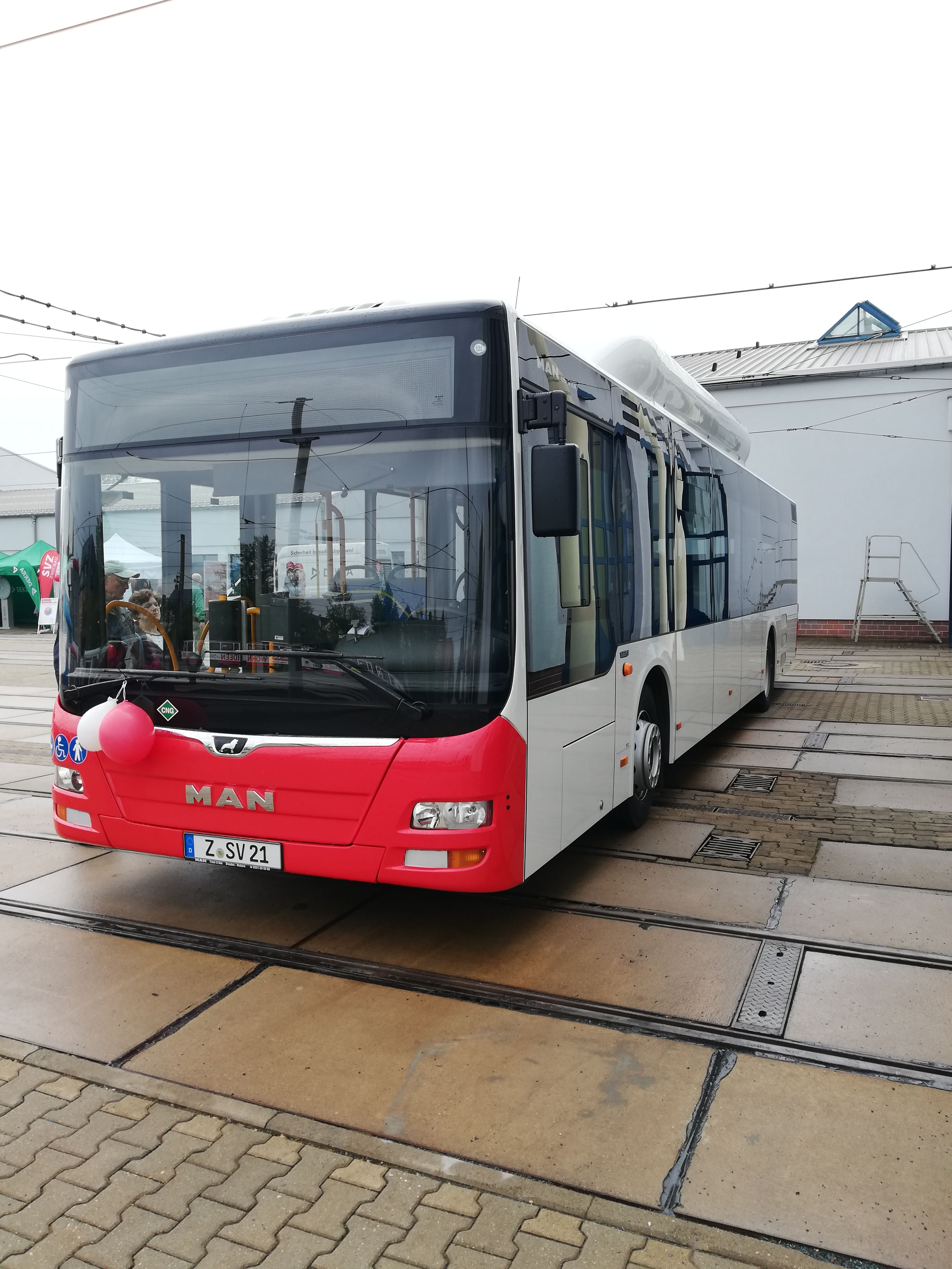 MAN Lions City